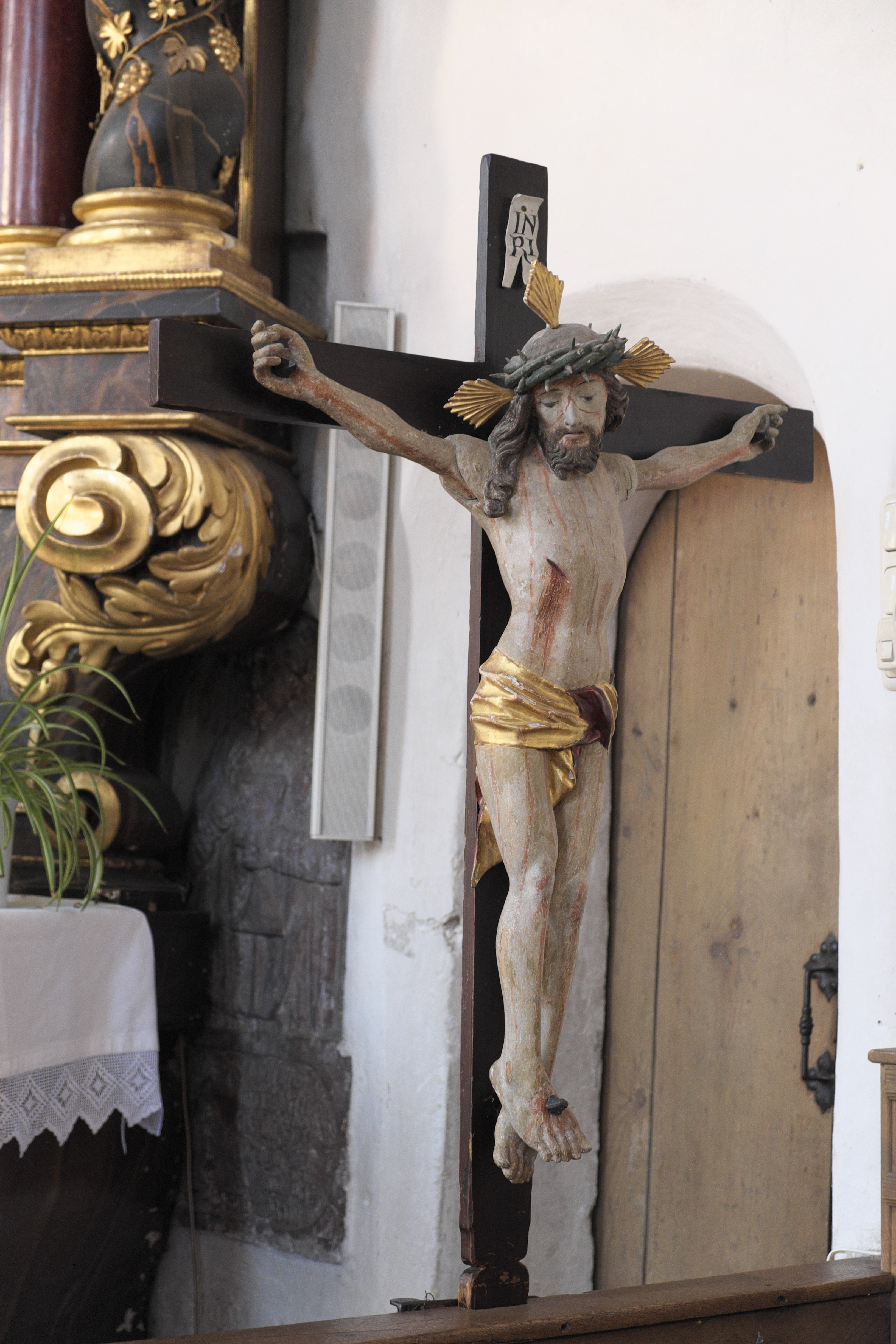 Katholische Pfarrkirche St. Emmeram in Kleinhelfendorf (Aying) im Landkreis München (Bayern/Deutschland), Kruzifix